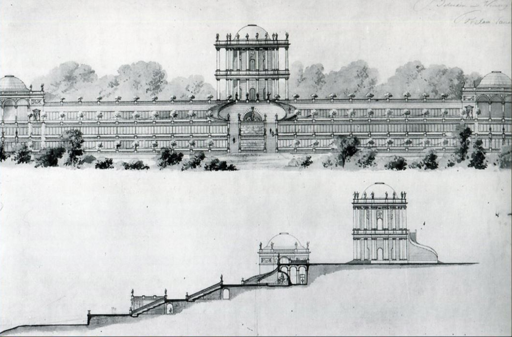 Plan für eine Gartenanlage am Klausberg in Potsdam, nicht ausgeführt